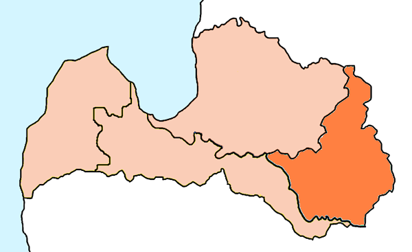 Mappa della diocesi cattolica di Rezekne-Aglona, in Lettonia. Opera personale. Fonte per i confini delle diocesi